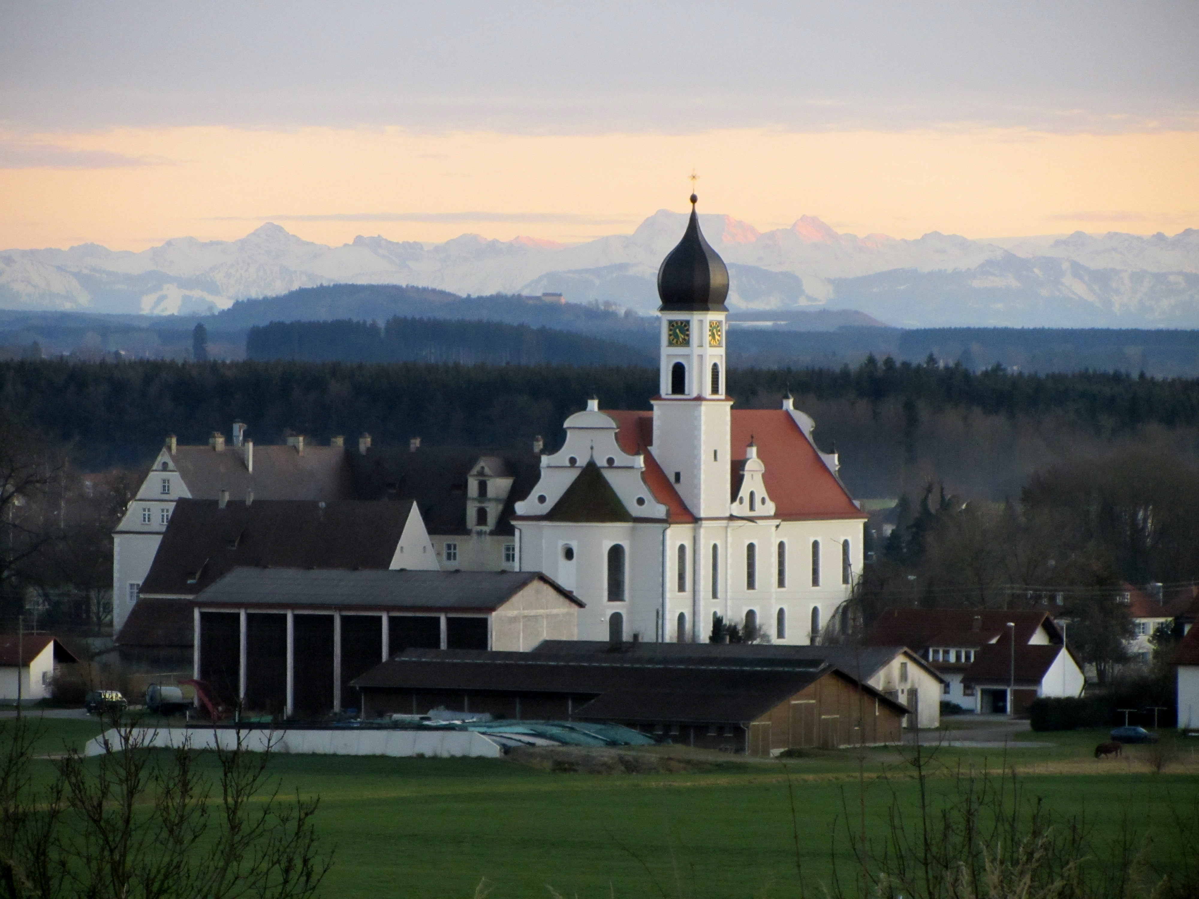 Pfarrkirche St. Martin - Aufgenommen nahe der Keltenschanze